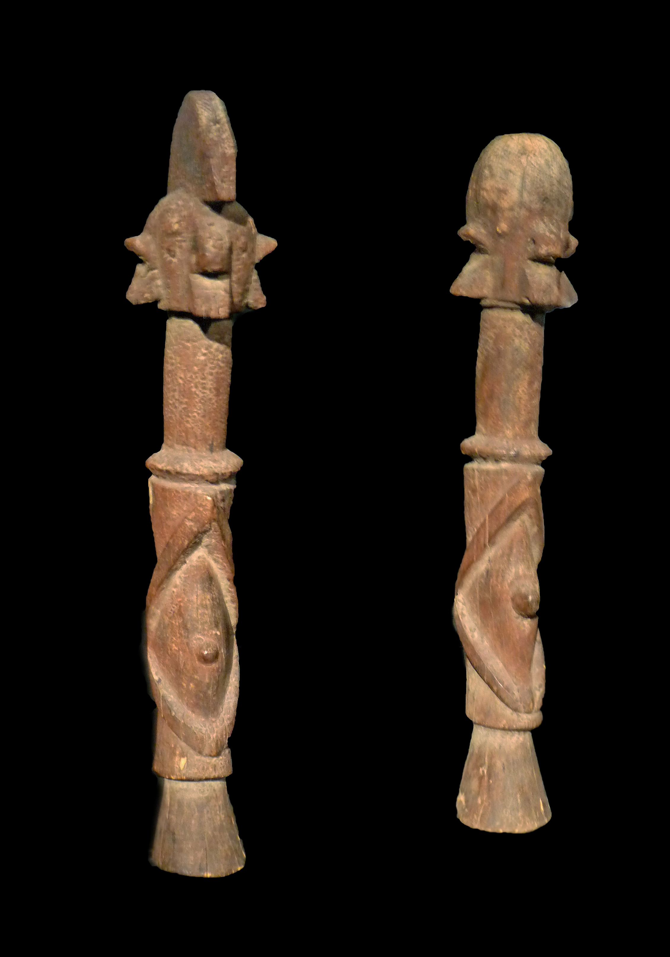 Paire masculine et féminine kundul Wurkun Nigeria Début du 19e siècle Bois et fibres Musée du Quai Branly N° d'inventaire : 70.2001.3. 1 et 70.2001.3.2 Exposition Nigeria. Arts de la vallée de la Bénoué au musée du quai Branly (Paris).